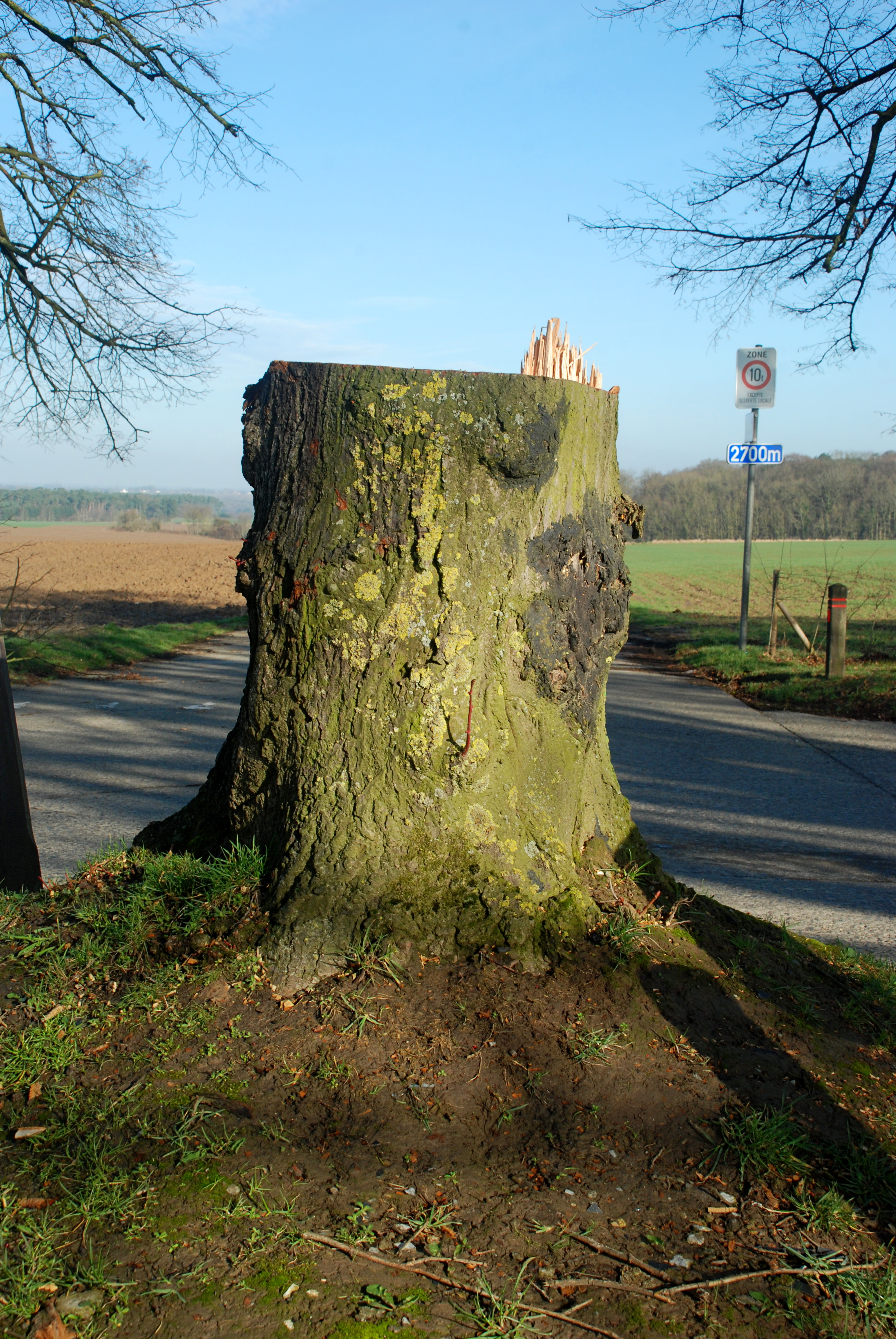 Belgique - Brabant wallon - Court-Saint-Étienne - Arbre de la justice (après acte de vandalisme en février 2017)